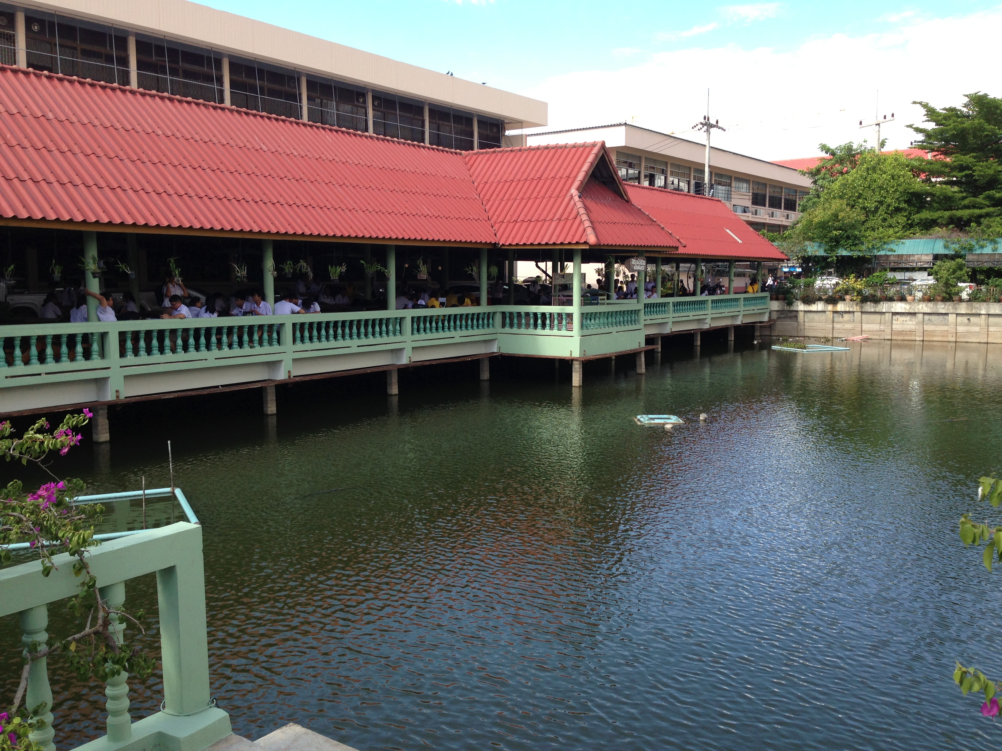 สระน้ำกลางโรงเรียนชัยภูมิภักดีชุมพล